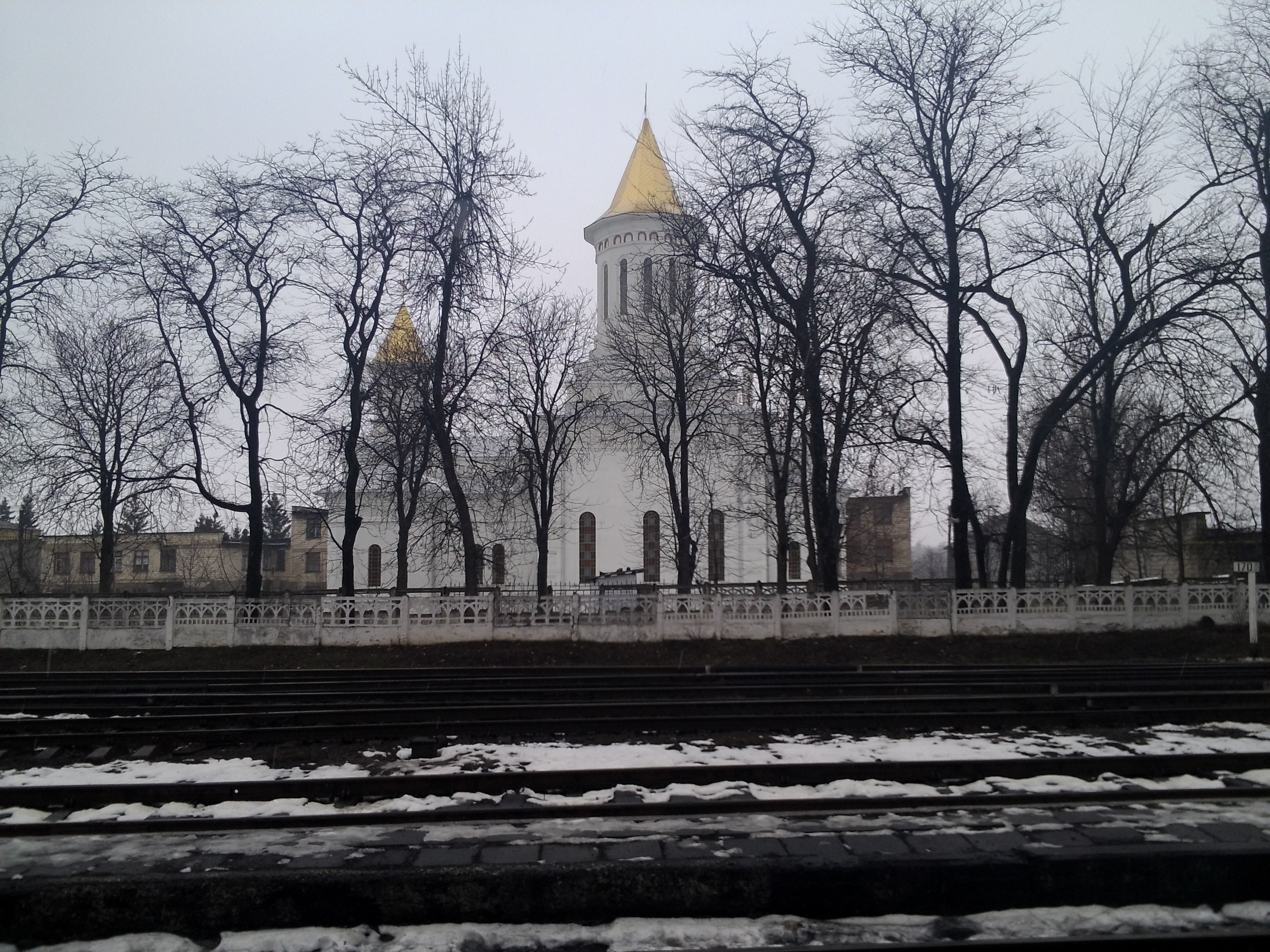 Церква в м. Окниця